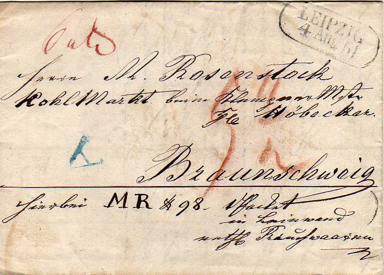 Paketbegleitbrief aufgegeben am 4. August 1851 in Leipzig von der Firma Hötte & Söhne (Vorderseite. Rückseite